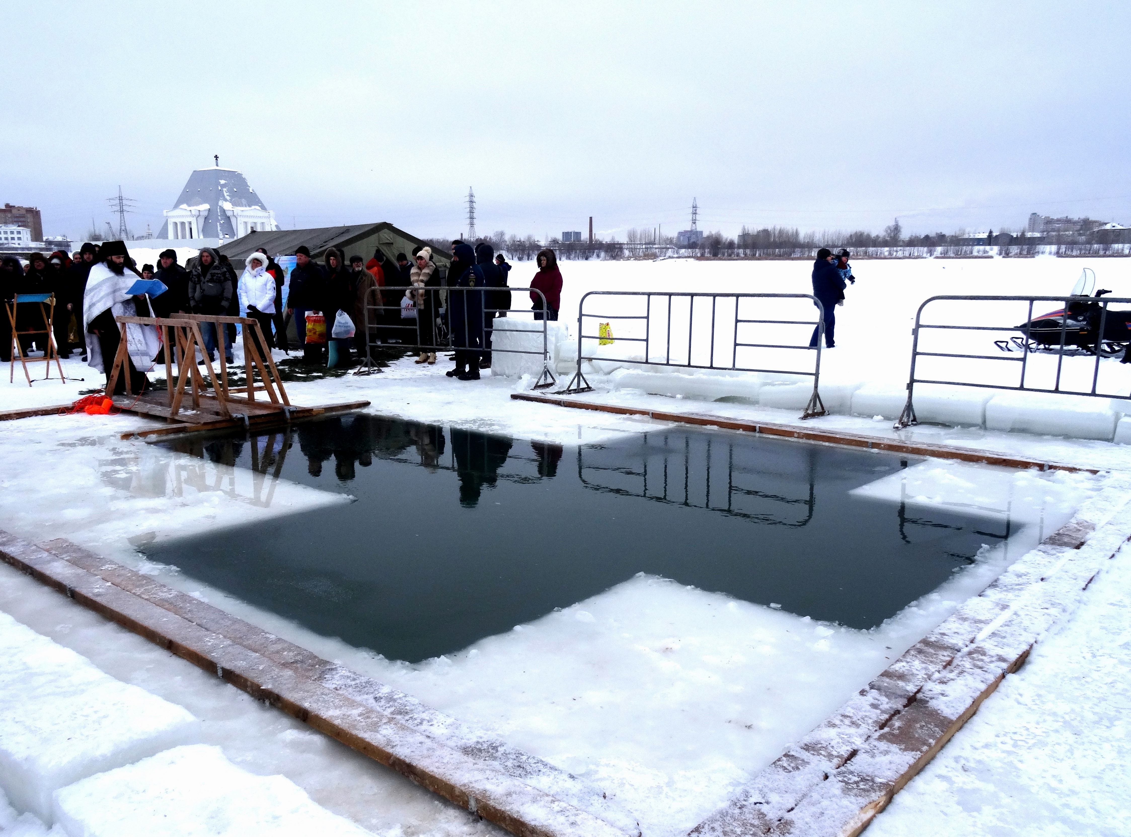 Празднование Крещения Господня у храма-памятника в честь Нерукотворенного Образа Спасителя на реке Казанке (г. Казань) (19 января 2017 г.)